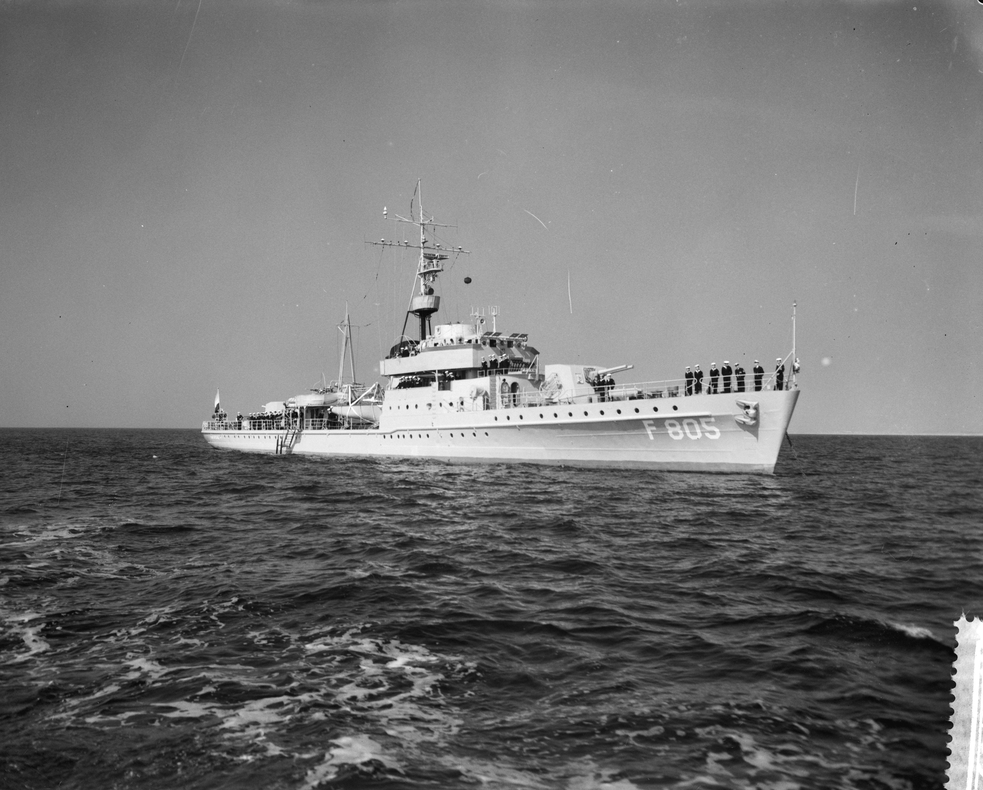 Collectie / Archief : Fotocollectie Anefo Reportage / Serie : [ onbekend ] Beschrijving : Aankomst in Den Helder van Hr. Ms. fregat Van Speijk Datum : 19 augustus 1959 Locatie : Marinebasis Den Helder Trefwoorden : marine, militaire vaartuigen Fotograaf : Bilsen, Joop van / Anefo Auteursrechthebbende : Nationaal Archief Materiaalsoort : Negatief (zwart/wit) Nummer archiefinventaris : bekijk toegang 2.24.01.04 Bestanddeelnummer : 910-6105